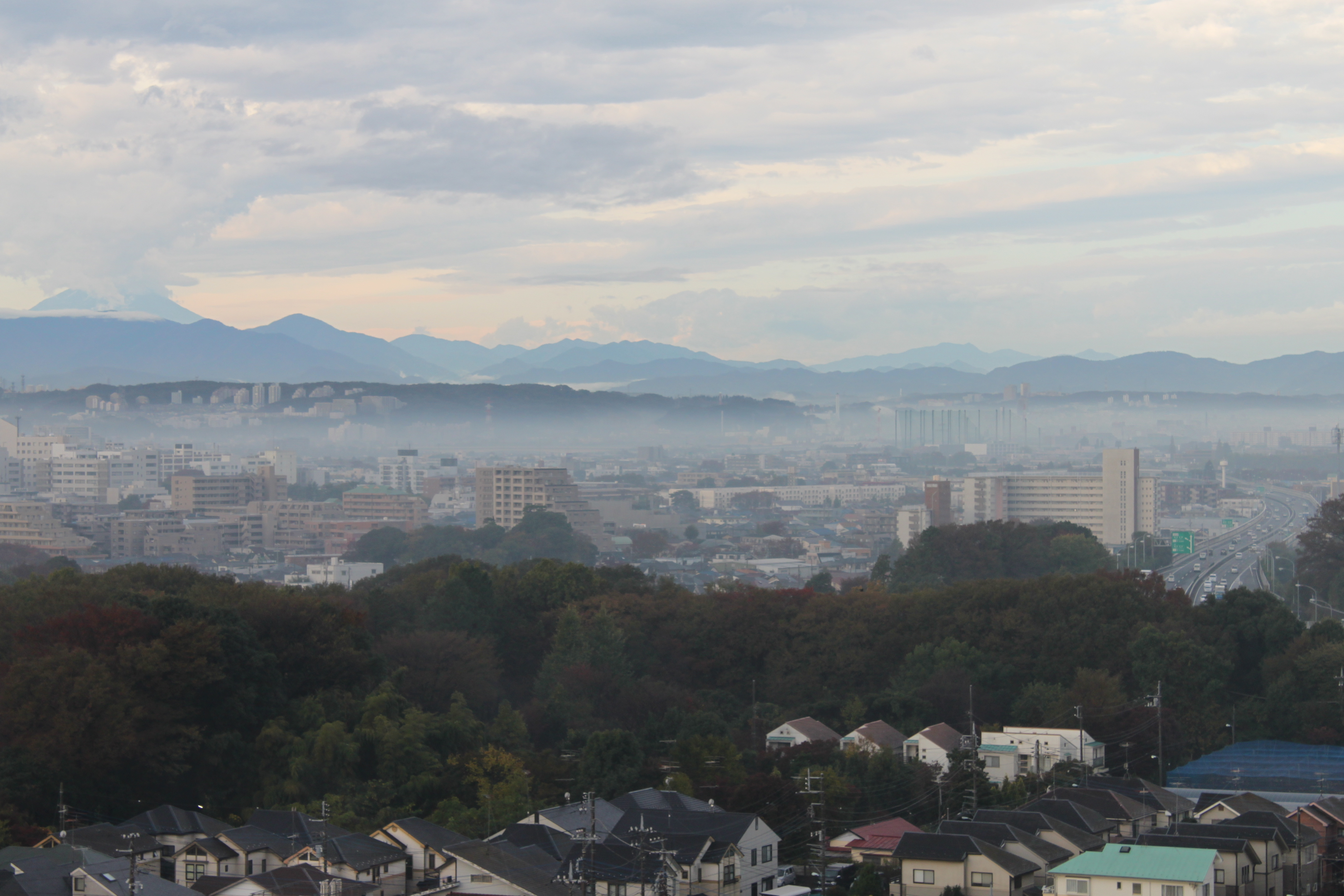 3 Chome Jindaiji Minamimachi, Chōfu-shi, Tōkyō-to 182-0013, Japan